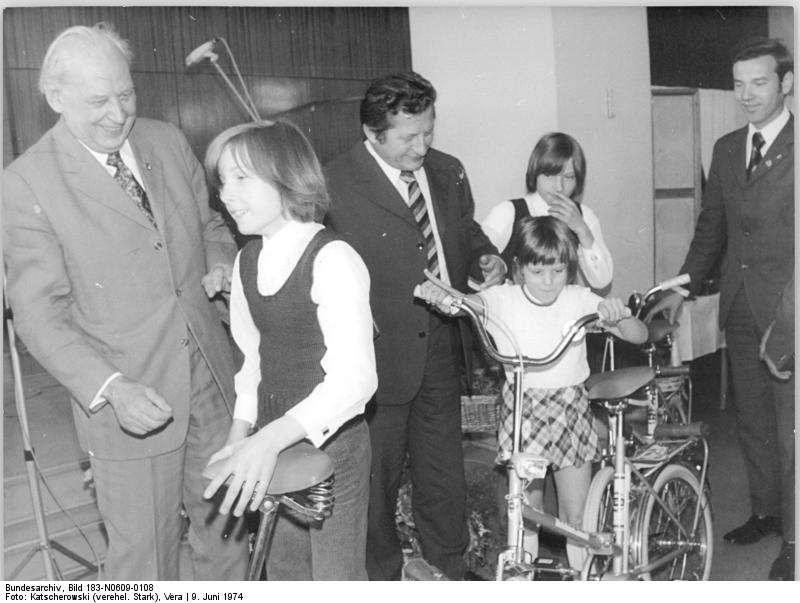 Erfurt, Preisverleihung, Herbert Warnke ADN-ZB Katscherowski 9.6.74 Erfurt: 15. Arbeiterfestspiele - Der Kunstpreis des FDGB wurde am 9.6.74 im Interhotel "Erfurter Hof" verliehen. Für den mehrteiligen Fernsehfilm "Aber Vati!" erhielt der Schauspieler Erik S. Klein (3.v.l.) die Auszeichnung. Die Kinderdarsteller, die die Zwillinge und Frenze spielten, bekamen Klappfahrräder. Die Auszeichnung nahm Herbert Warnke (l.), Mitglied des Politbüros des ZK der SED und Vorsitzender des FDGB-Bundesvorstandes, vor.